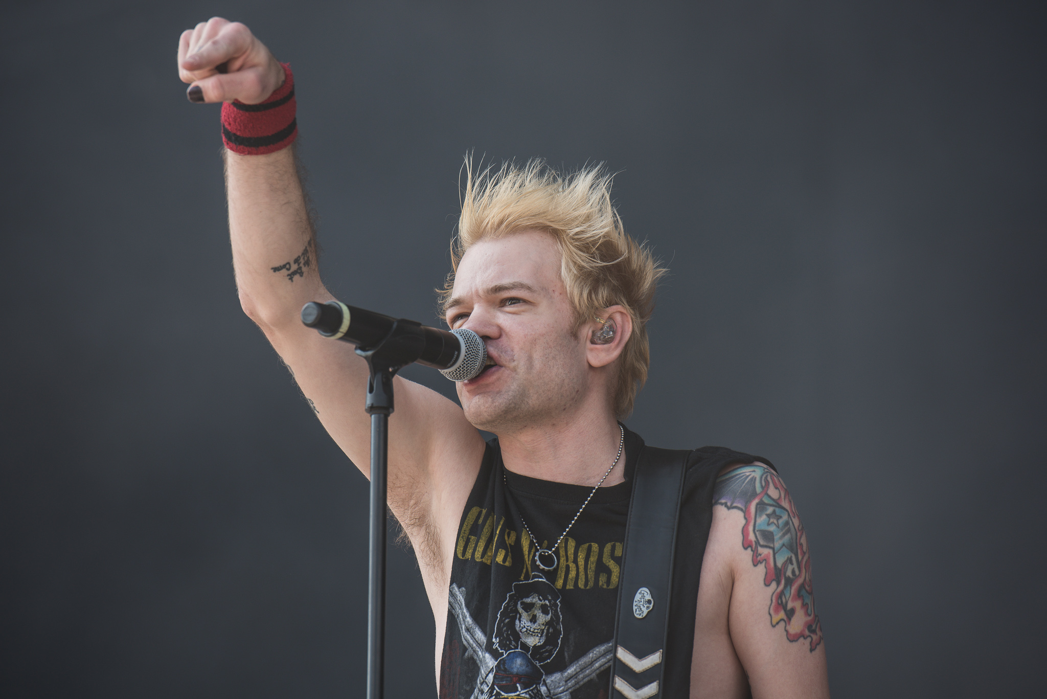 ARGO-Konzerte,Deryck Whibley,Konzert,Livekonzert,Livemusik,Musik,RiP,Rock im Park 2017,Sum 41,Zeppelin Stage